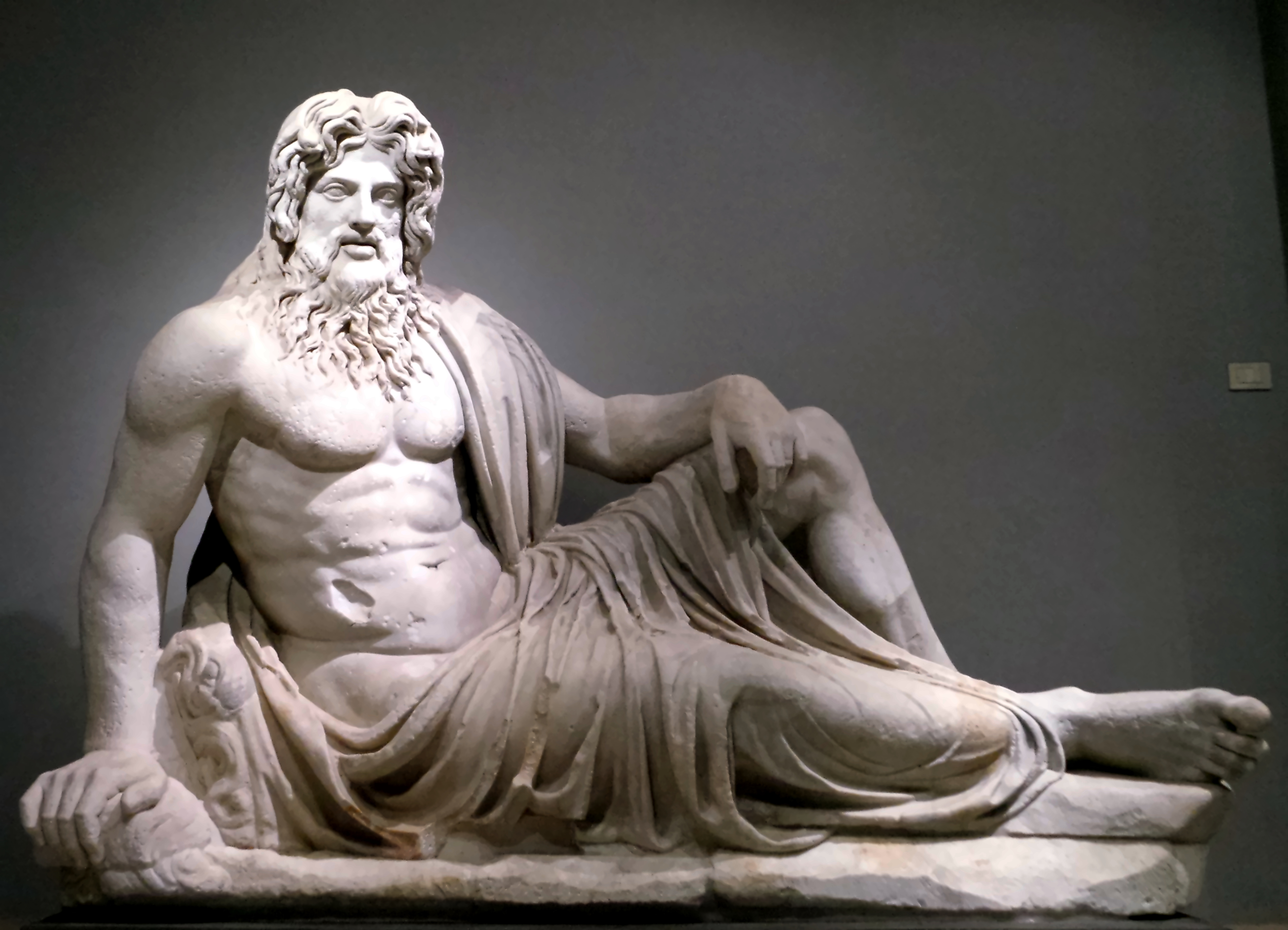 Restaurierte Staue des Oceanus. Ausgestellt in den Vatikanischen Museen